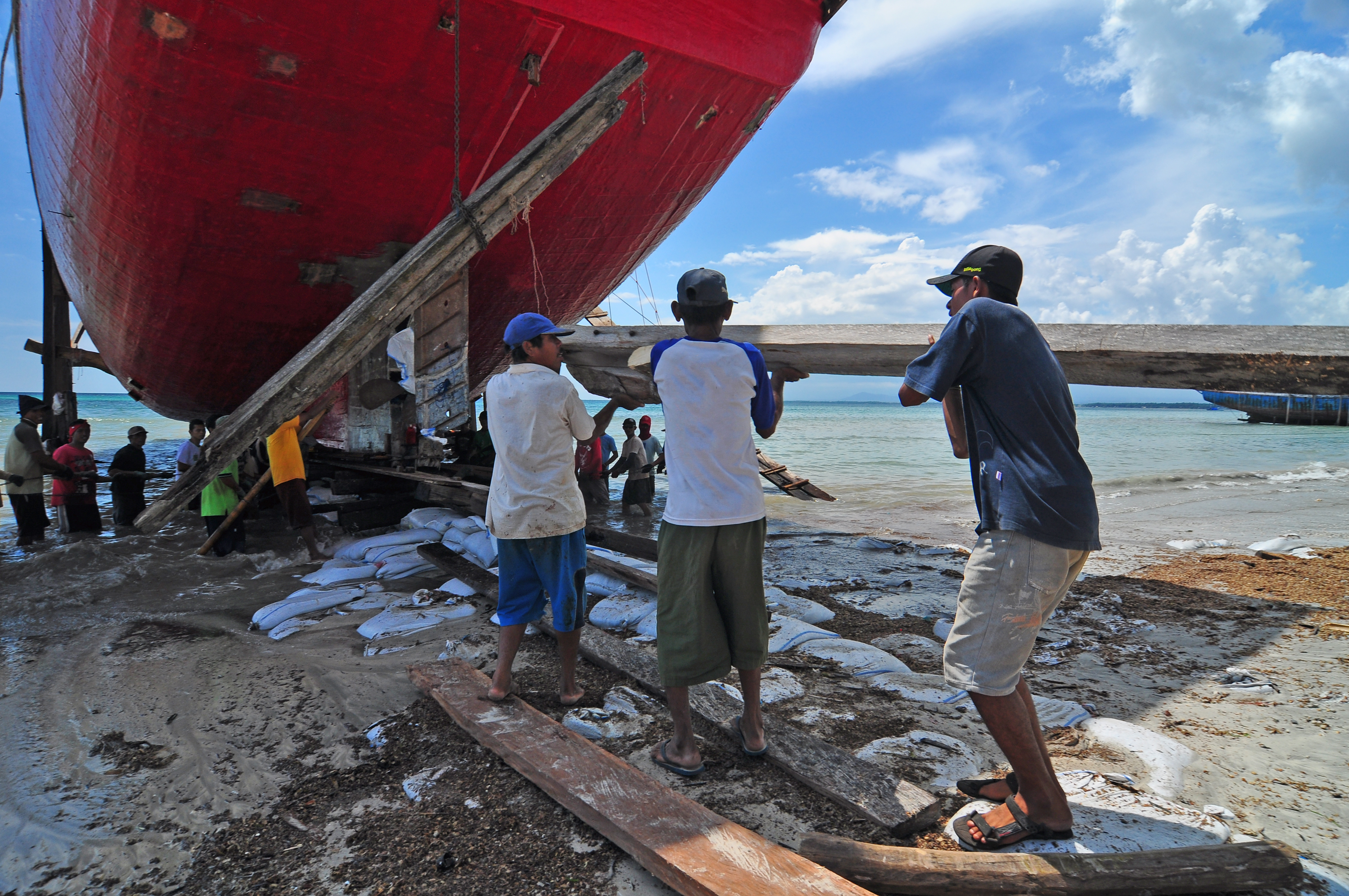 Annyorong lopi , Bontu bahari, Bulukumba